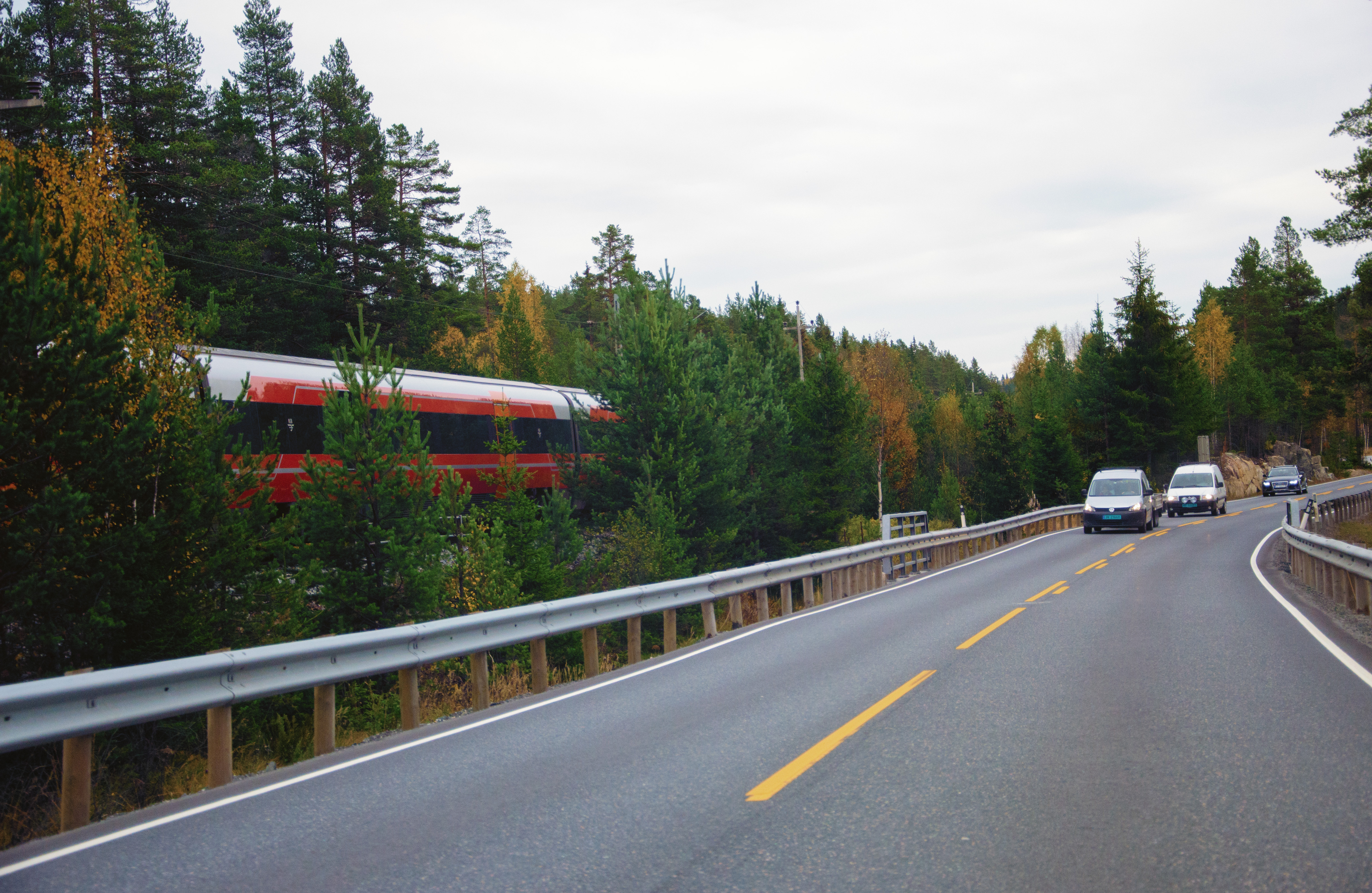 E134 Meheiaveien i Kongsberg